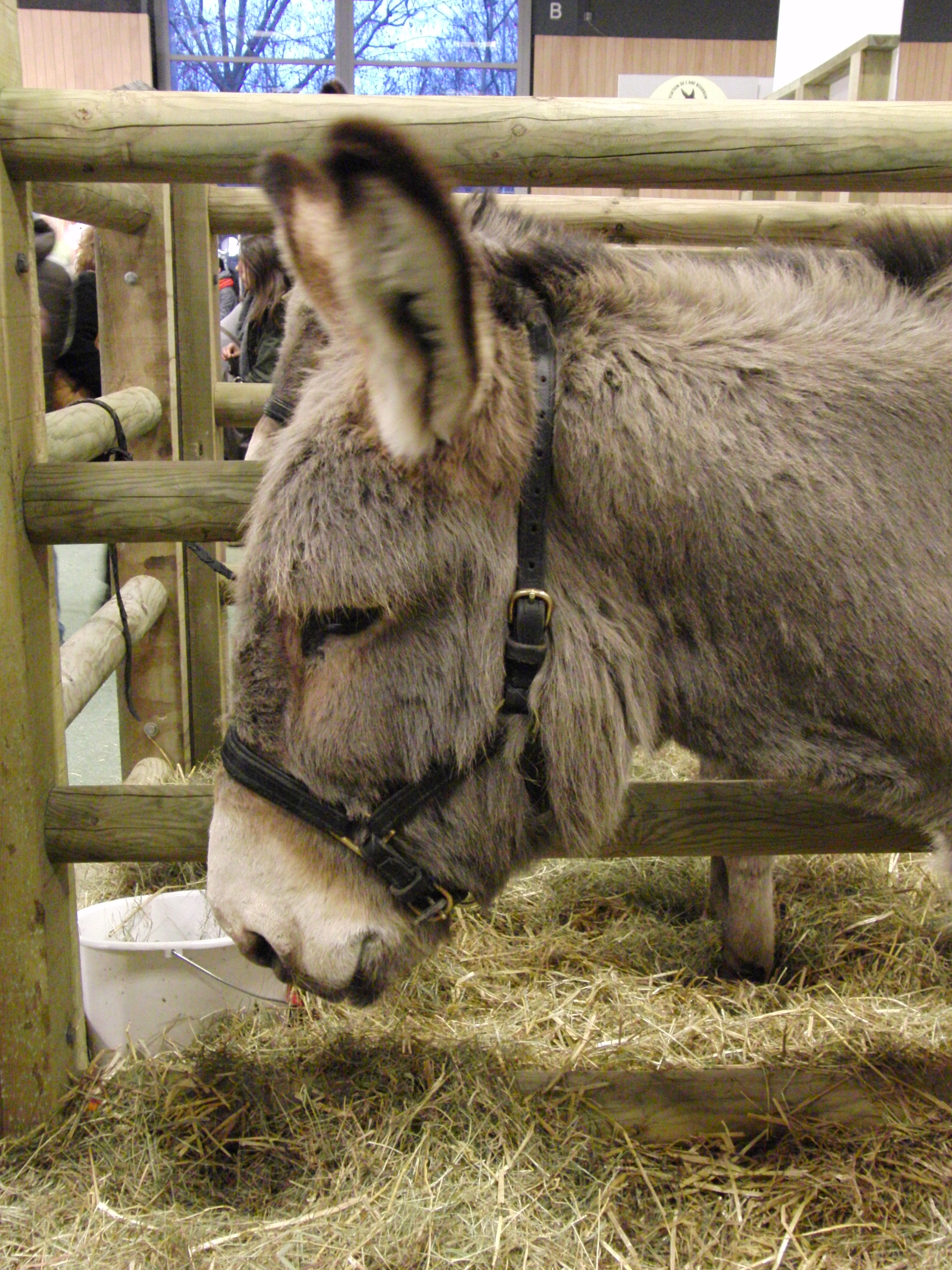 Tête d'un âne du Cotentin - Salon international de l'agriculture 2013, Paris, France